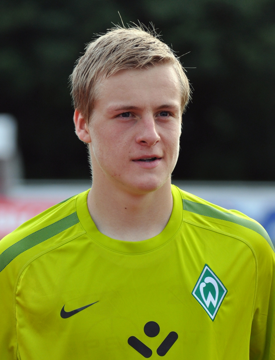 Felix Kroos